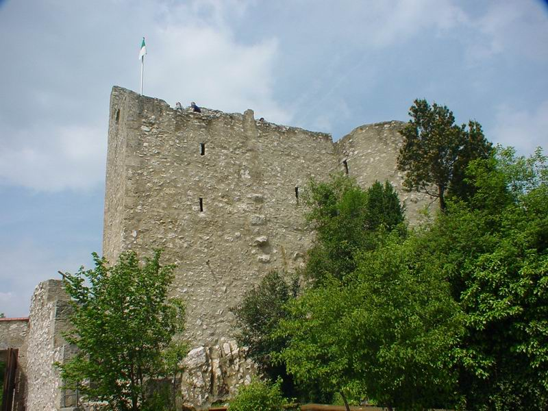 Derneck public domain, eigenes Foto von 2003. Die Schildmauer vom Hof aus. Mewes 20:15, 7. Feb 2005 (CET)